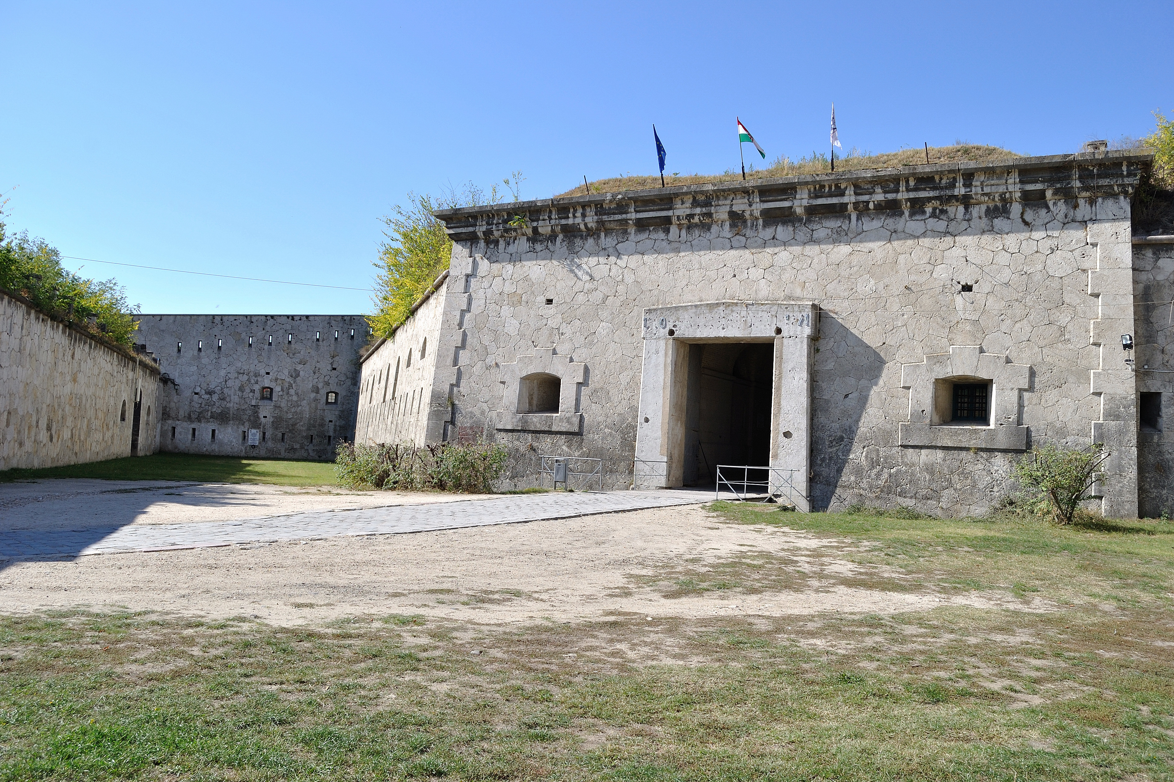 Monostori erőd This is a photo of a monument in Hungary. Identifier: 6306